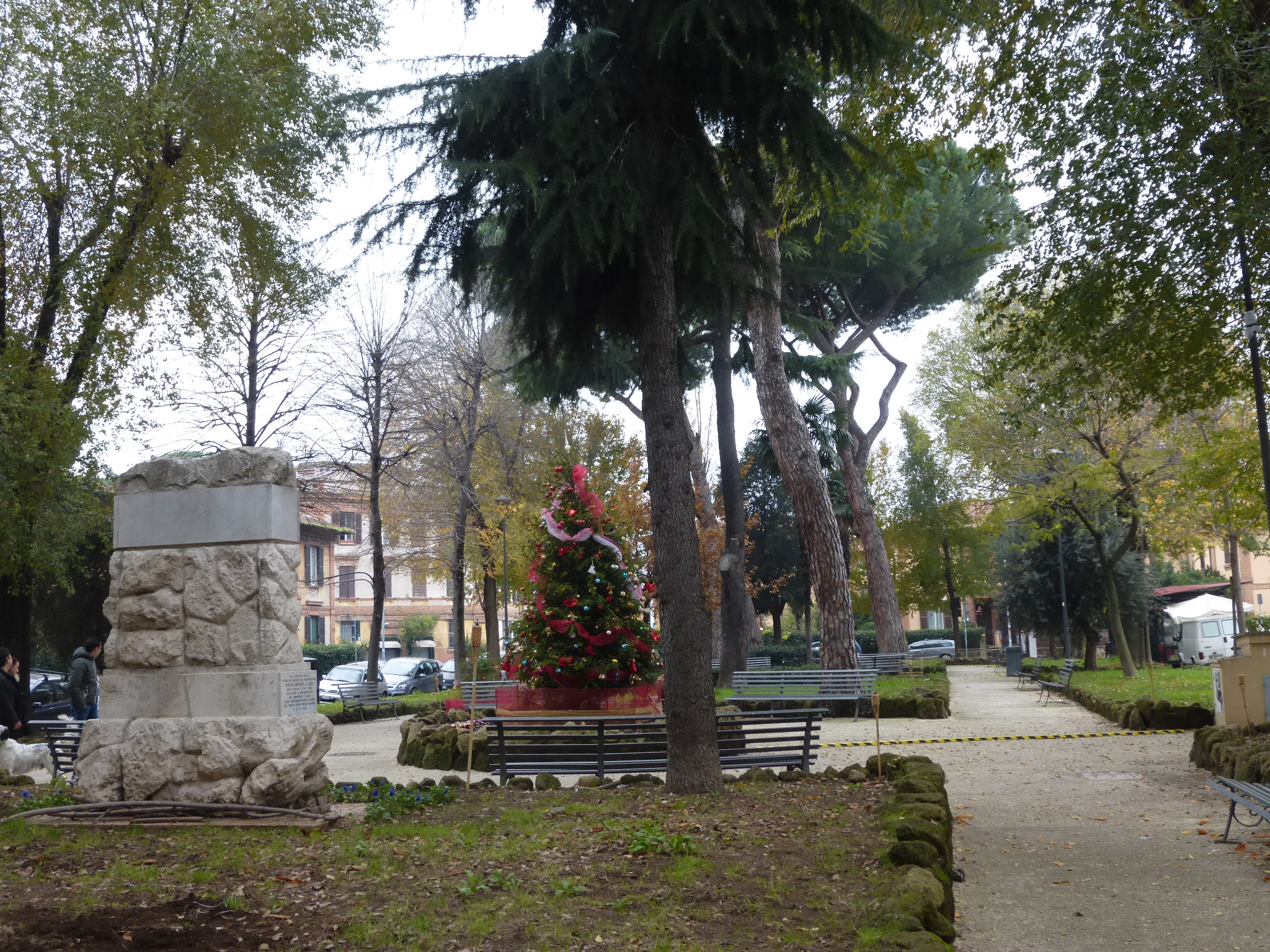 Roma piazza Bernini, albero di Natale 2014.